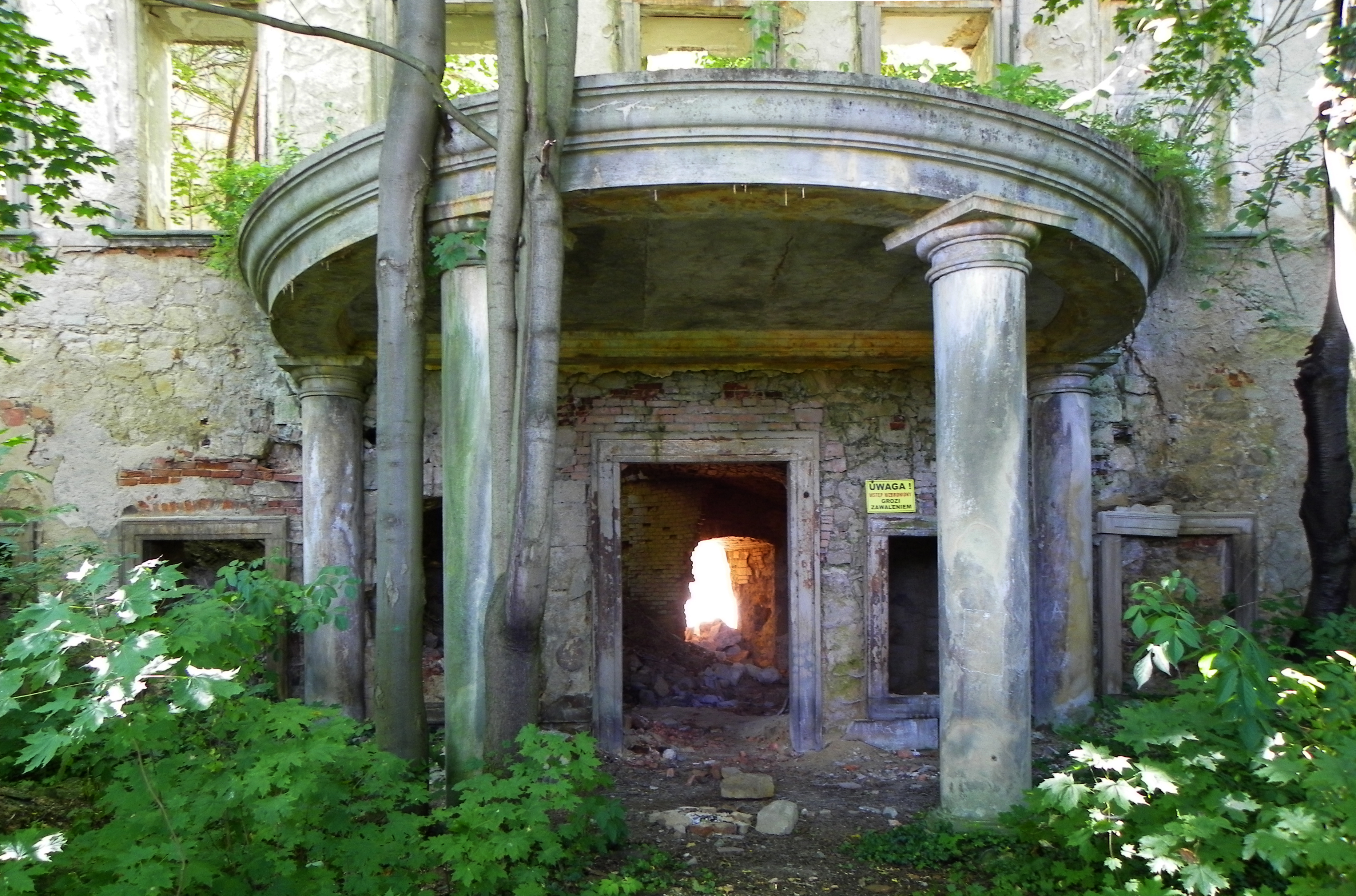 Skała, ruiny zespołu pałacowego